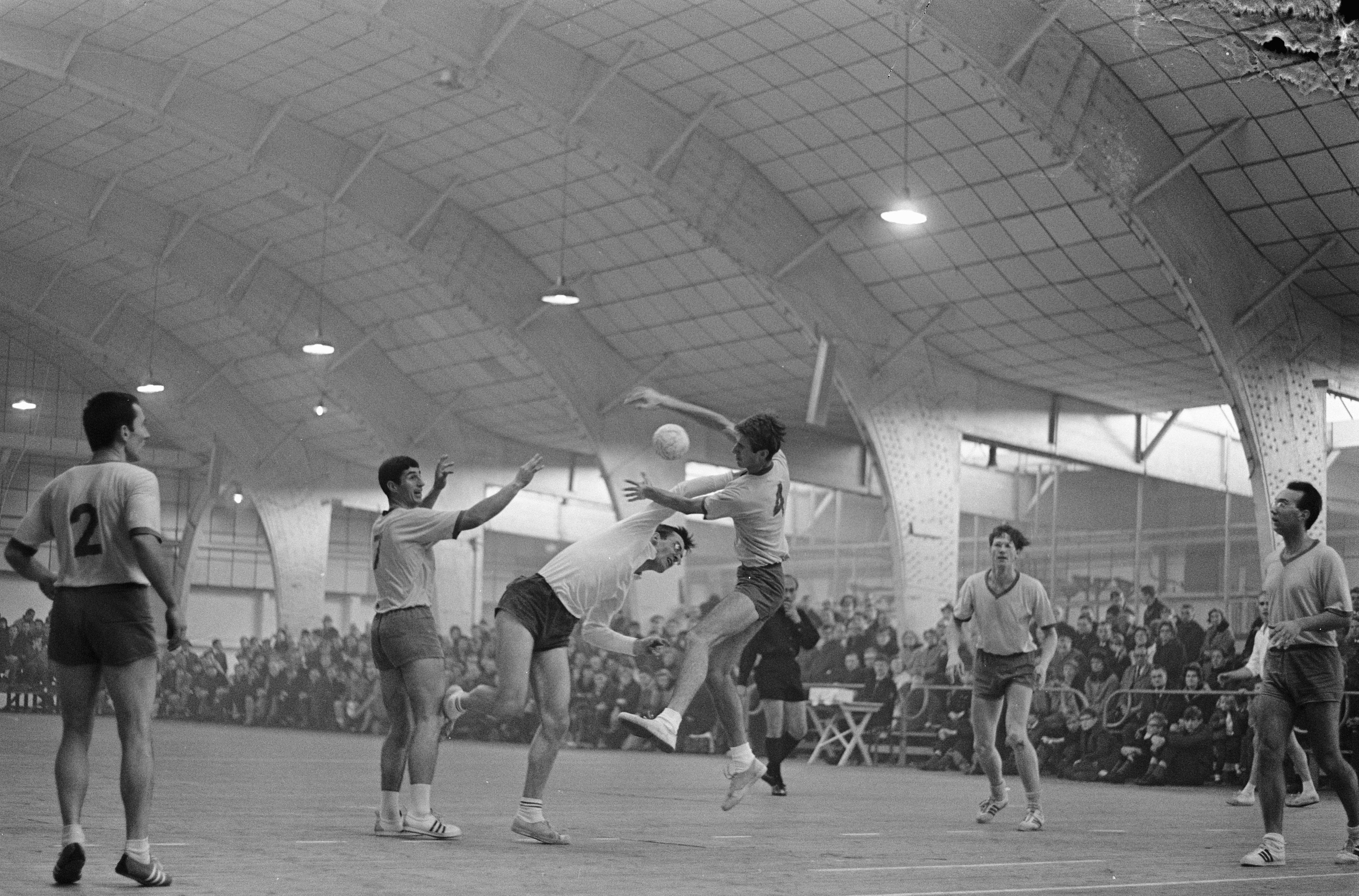 Collectie / Archief : Fotocollectie Anefo Reportage / Serie : [ onbekend ] Beschrijving : Zaalhandbal Aalsmeer tegen Sittardia 10-17, speler Aalsmeer gaat scoren Datum : 4 december 1966 Locatie : Aalsmeer, Noord-Holland Trefwoorden : Zaalhandbal Instellingsnaam : Sittardia Fotograaf : Steinmeier, Hans / Anefo Auteursrechthebbende : Nationaal Archief Materiaalsoort : Negatief (zwart/wit) Nummer archiefinventaris : bekijk toegang 2.24.01.05 Bestanddeelnummer : 919-8477